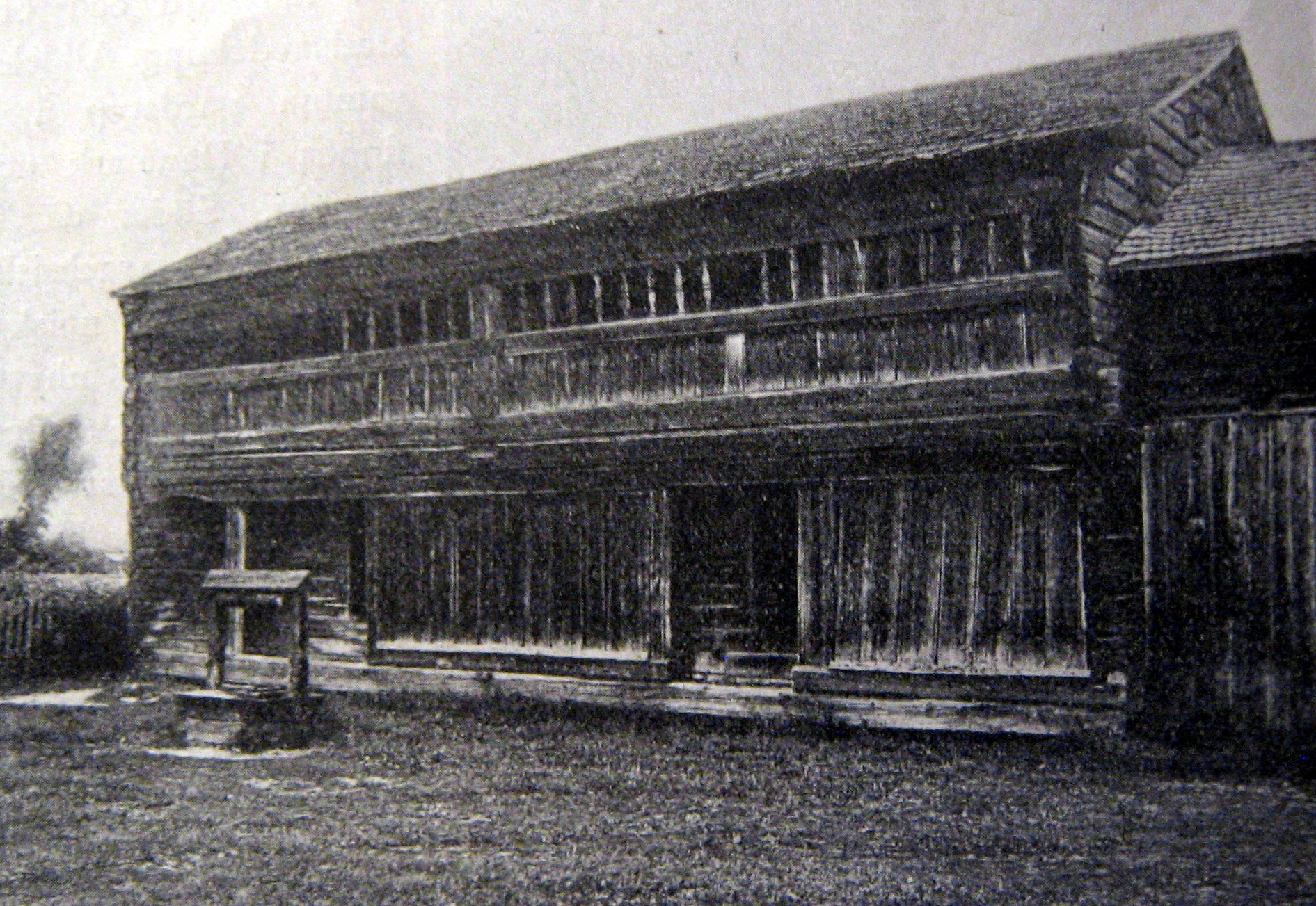 Bod i knuttimring med detaljer i resvirke i stavkonstruktion. Boden, här på sin ursprungliga plats i Nås socken, Dalarna, är senare flyttad till Skansen.